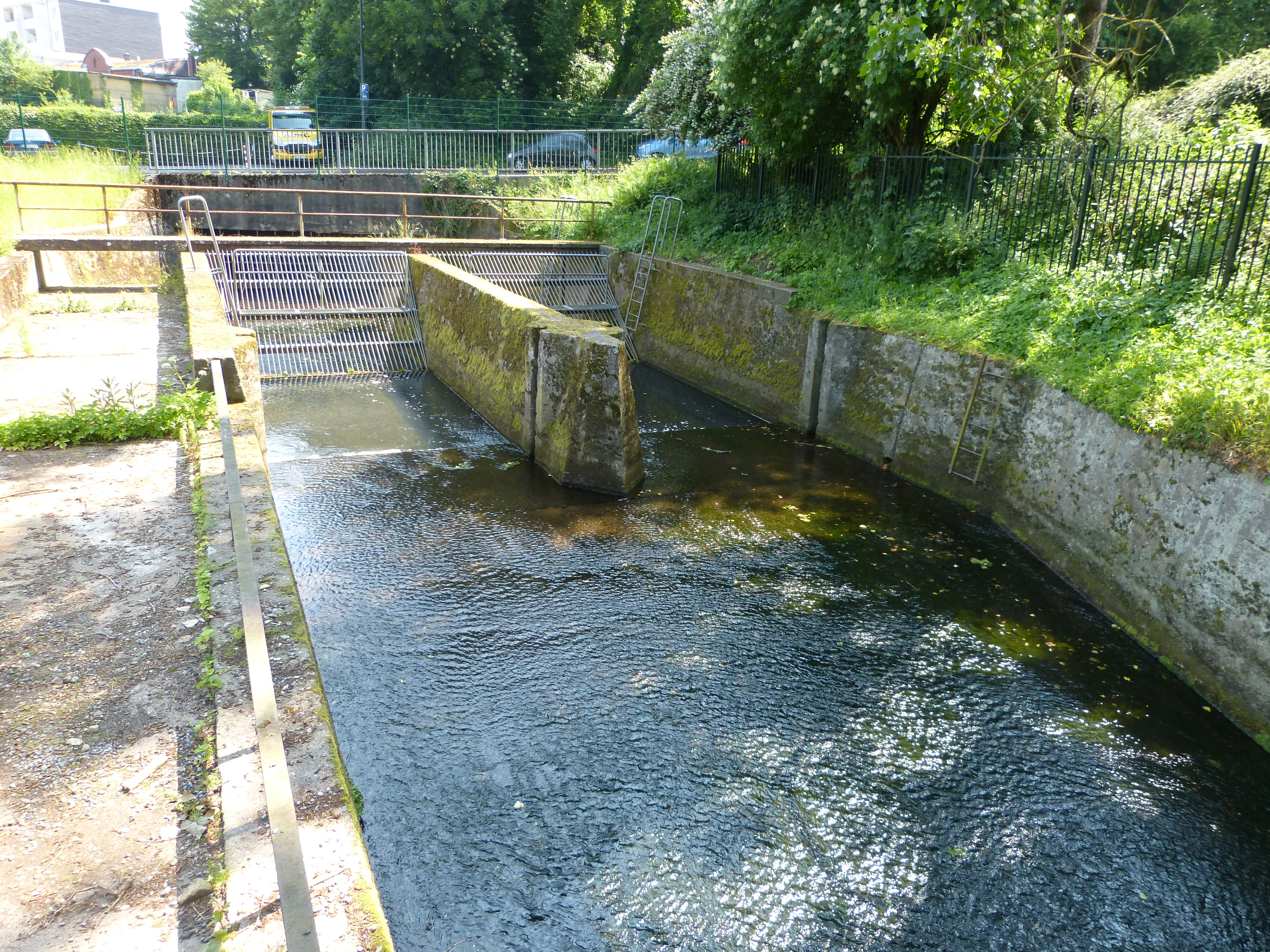 Aachen Obere Drimnbornstraße 8-12 - hier beginnt der unterirdische Lauf des Beverbachs, Nebenzufluss der Wurm.